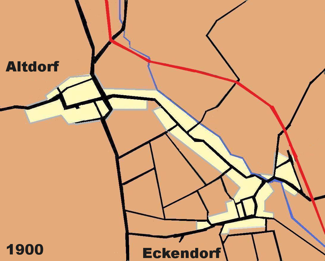 plan sommaire de la commune d'Alteckendorf en 1900, Légende: noir=routes, rouge=chemin de fer. bleu=ruisseau du Landgraben, jaune pale=zone urbanisée orange= champs et/ou prairies